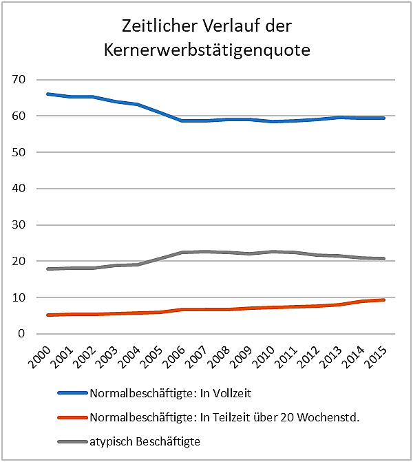 Basierend auf Daten aus Kleiner Anfrage an Bundesregierung, 18/12488